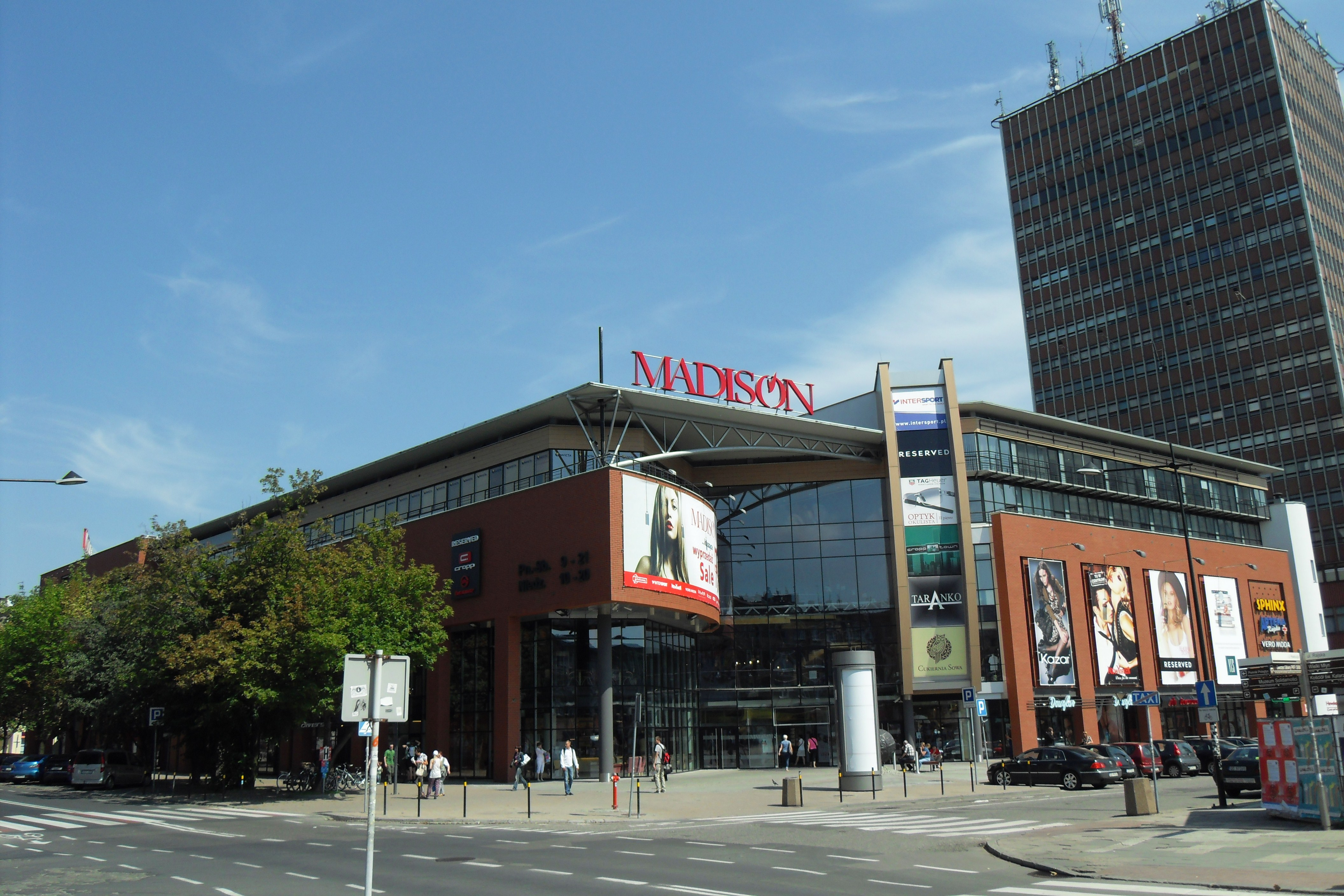 Gdańsk Stare Miasto. Galeria Handlowa Madison.